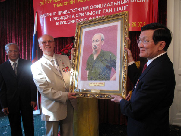 Президент СРВ Чыонг Тан Шанг вручает портрет Президента Хо Ши Мина Председателю Президиума Межрегиональной общественной организации ветеранов войны во Вьетнаме Н. Н. Колеснику.